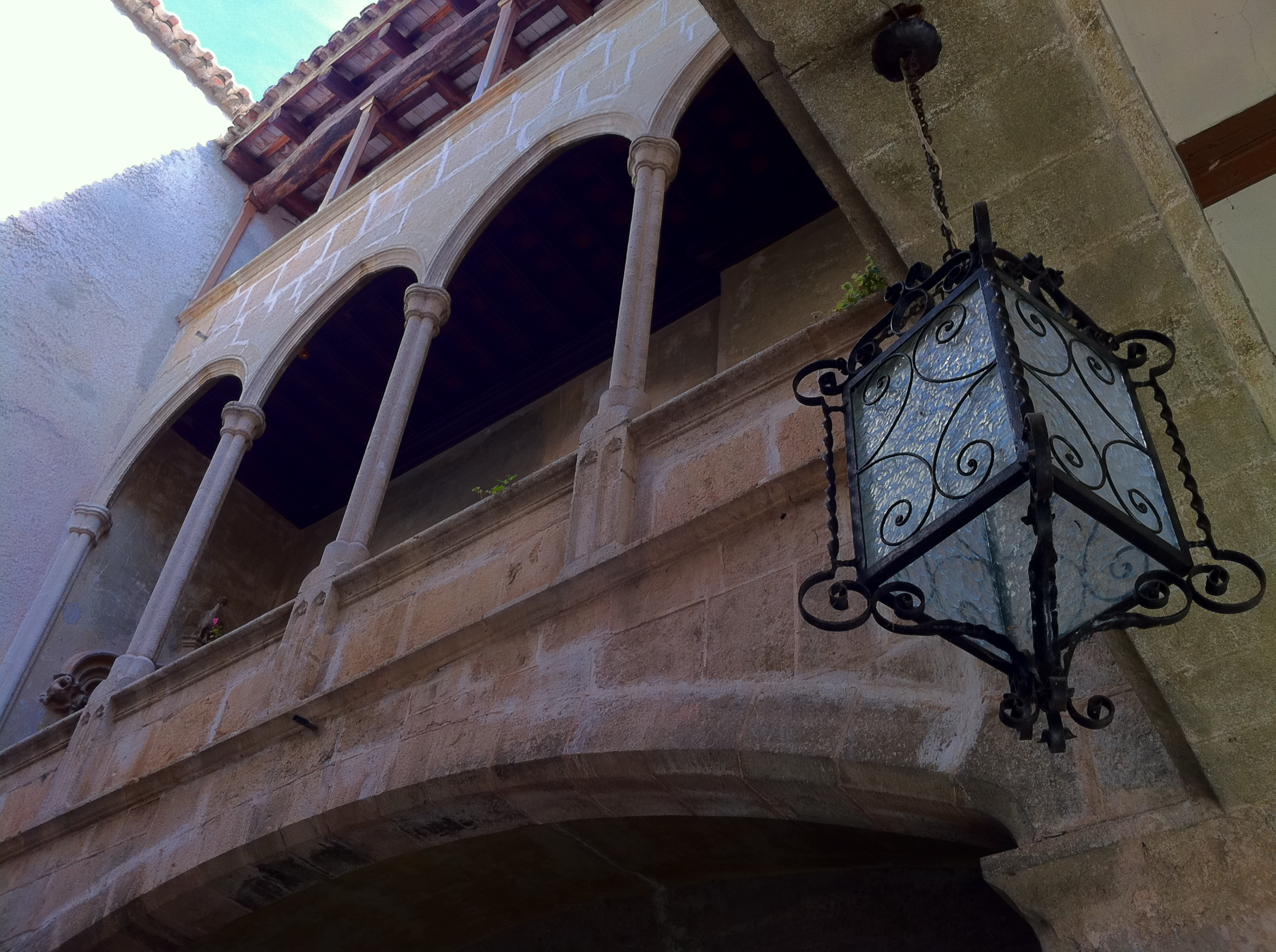 Torre Ramona (Subirats)